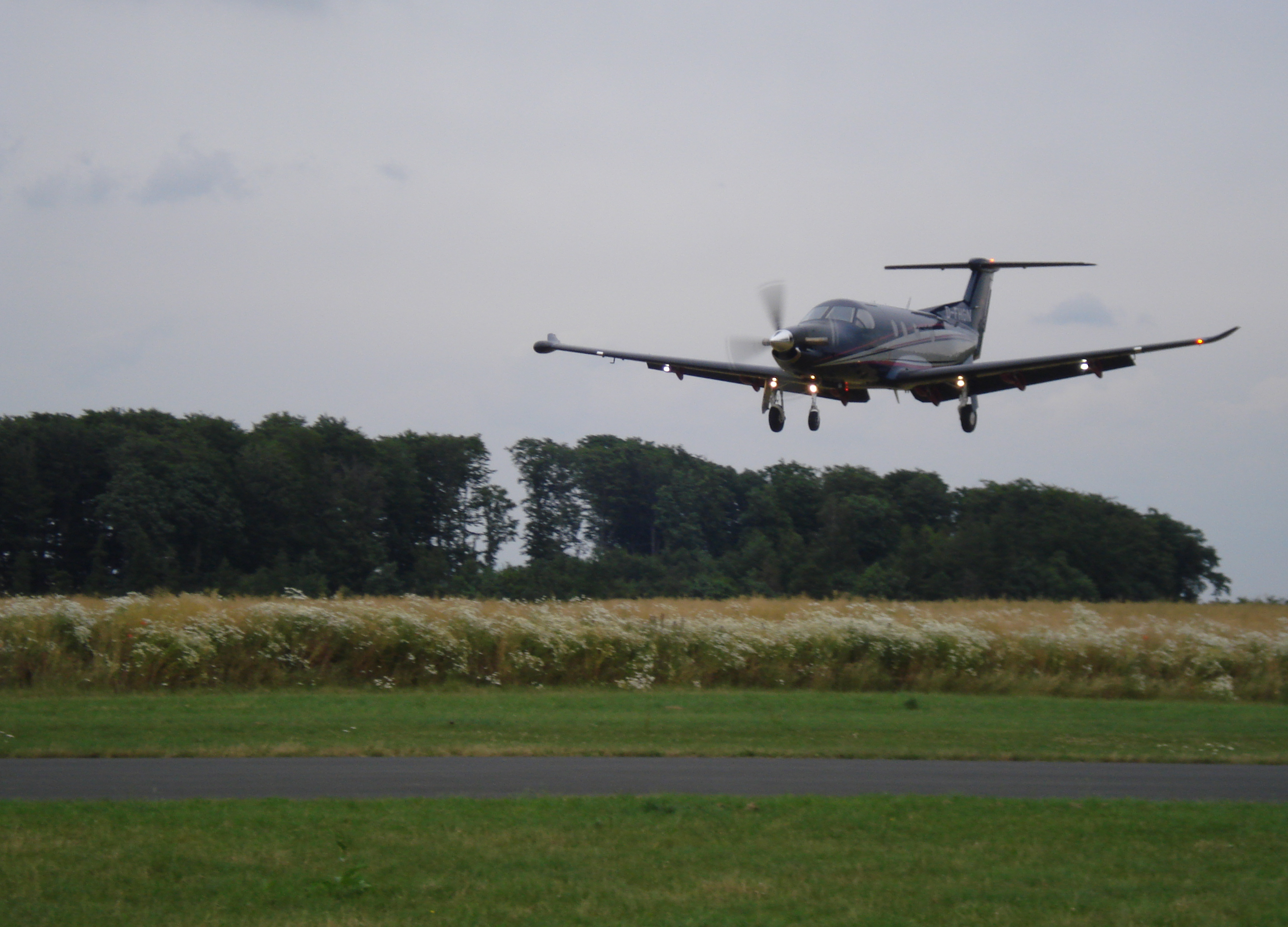 Pilatus PC 12 im Landeanflug auf den Flugplatz Günterode/Heiligenstadt